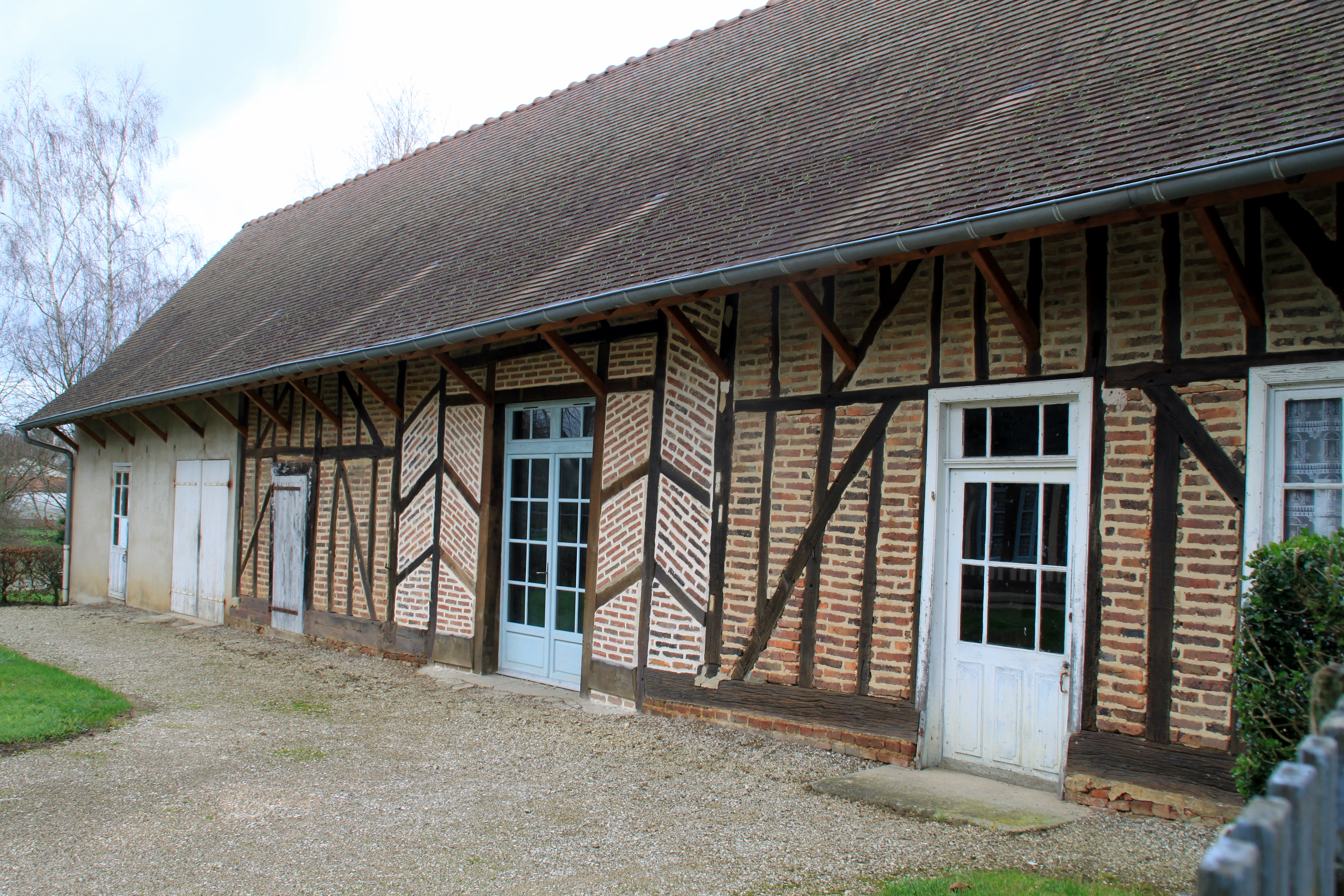 La Chapelle-Saint-Sauveur (Saône-et-Loire) Bressehaus